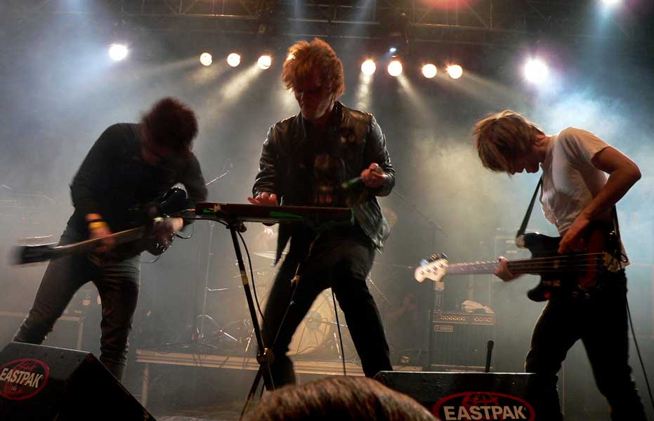 Disco Ensemble on July 4, 2007 in Simmering, Vienna, Vienna, AT.